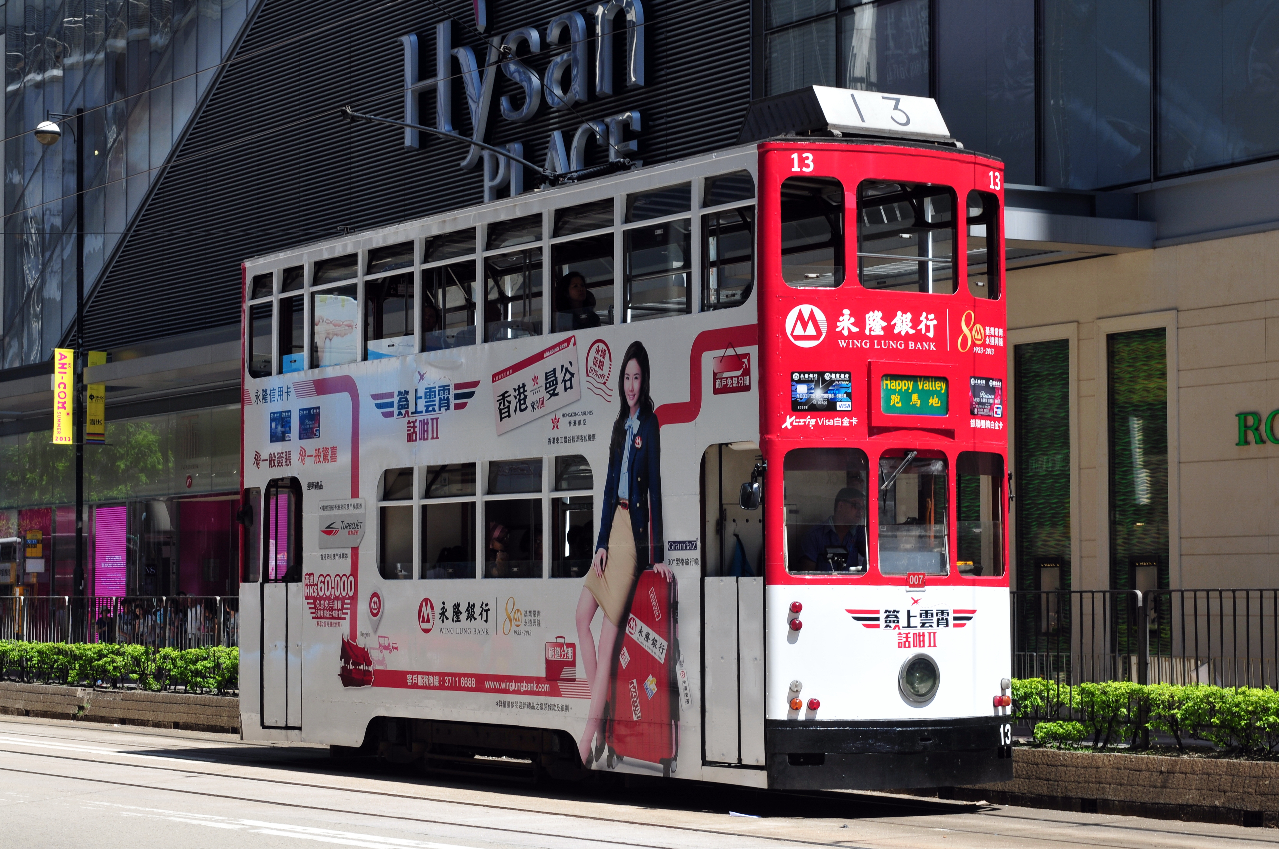 Wikimania 2013 Hongkong